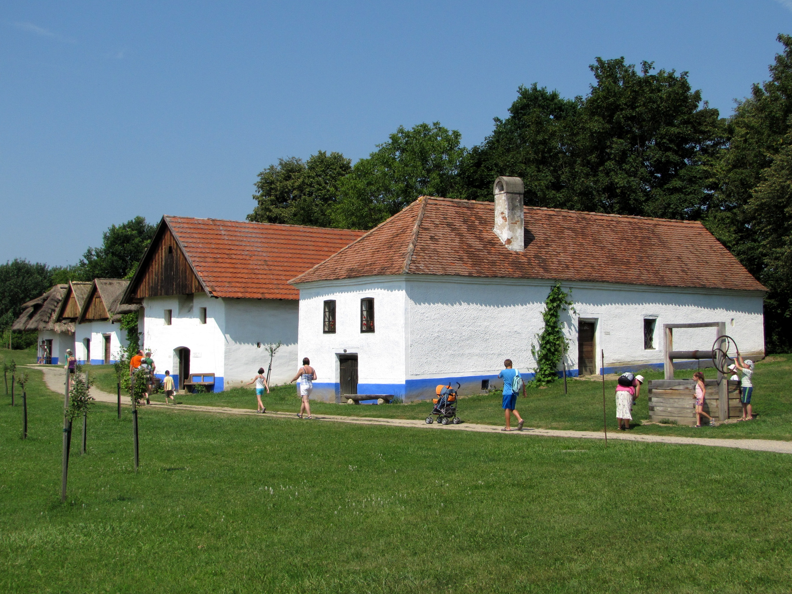 Areál vinohradnických staveb ve strážnickém skanzenu (Muzeum vesnice jihovýchodní Moravy)